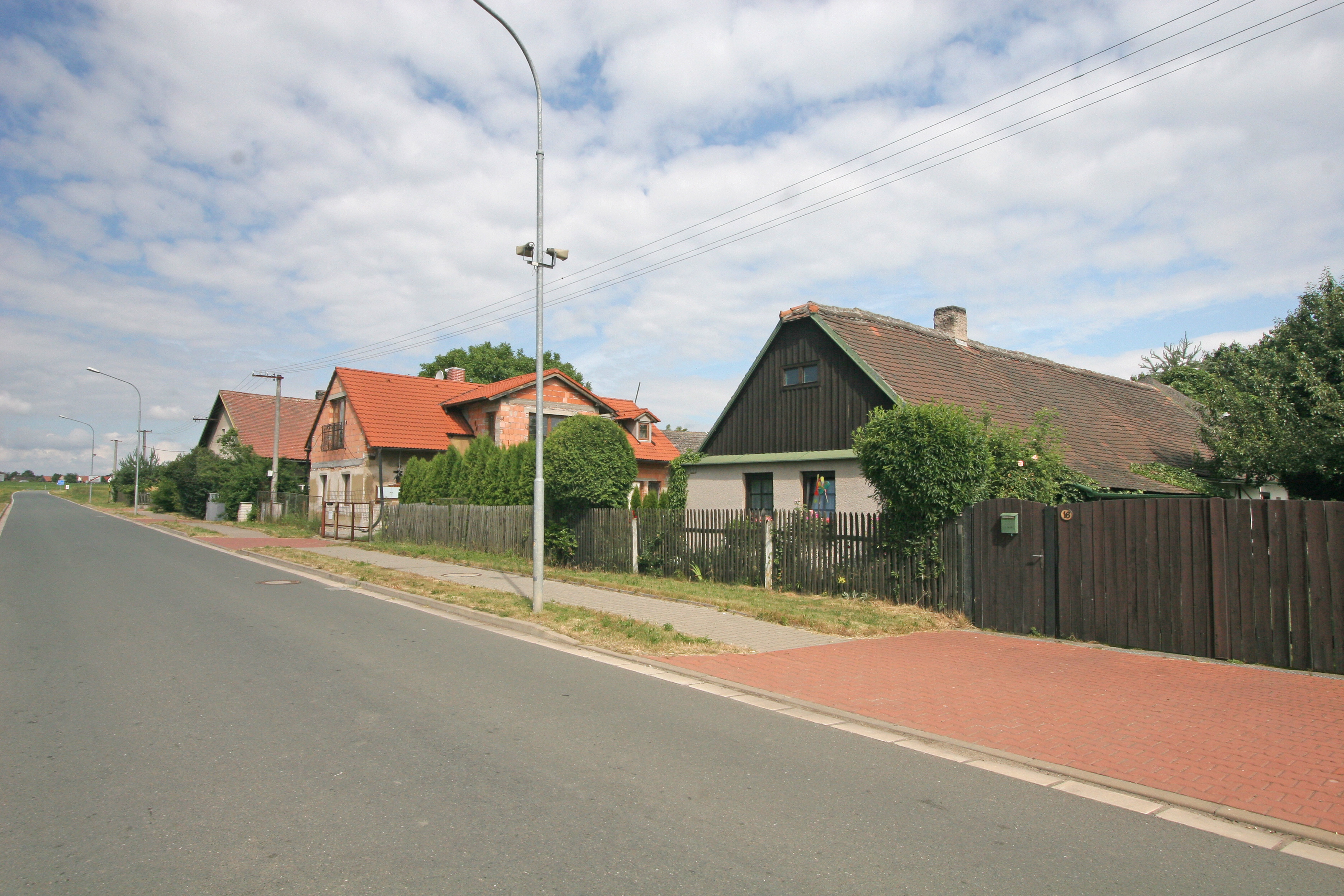 Pohránov čp. 16